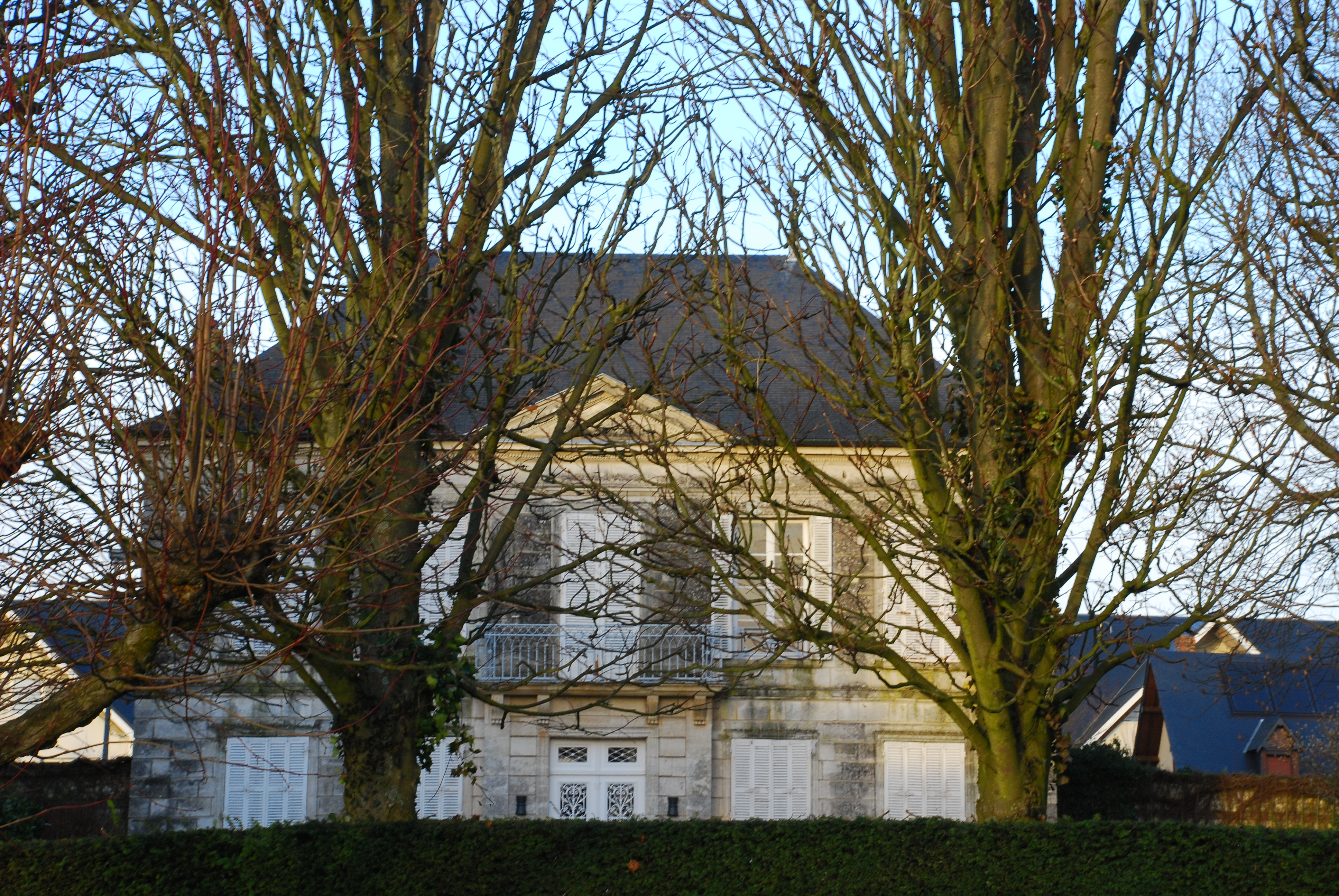 Maison, 29 rue Émile-Bénard8 rue de la Voie-romaine (Inscrit, 1986) .